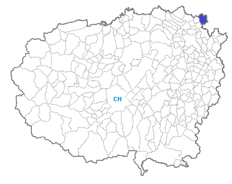 Posizione del comune nella provincia di Cuneo